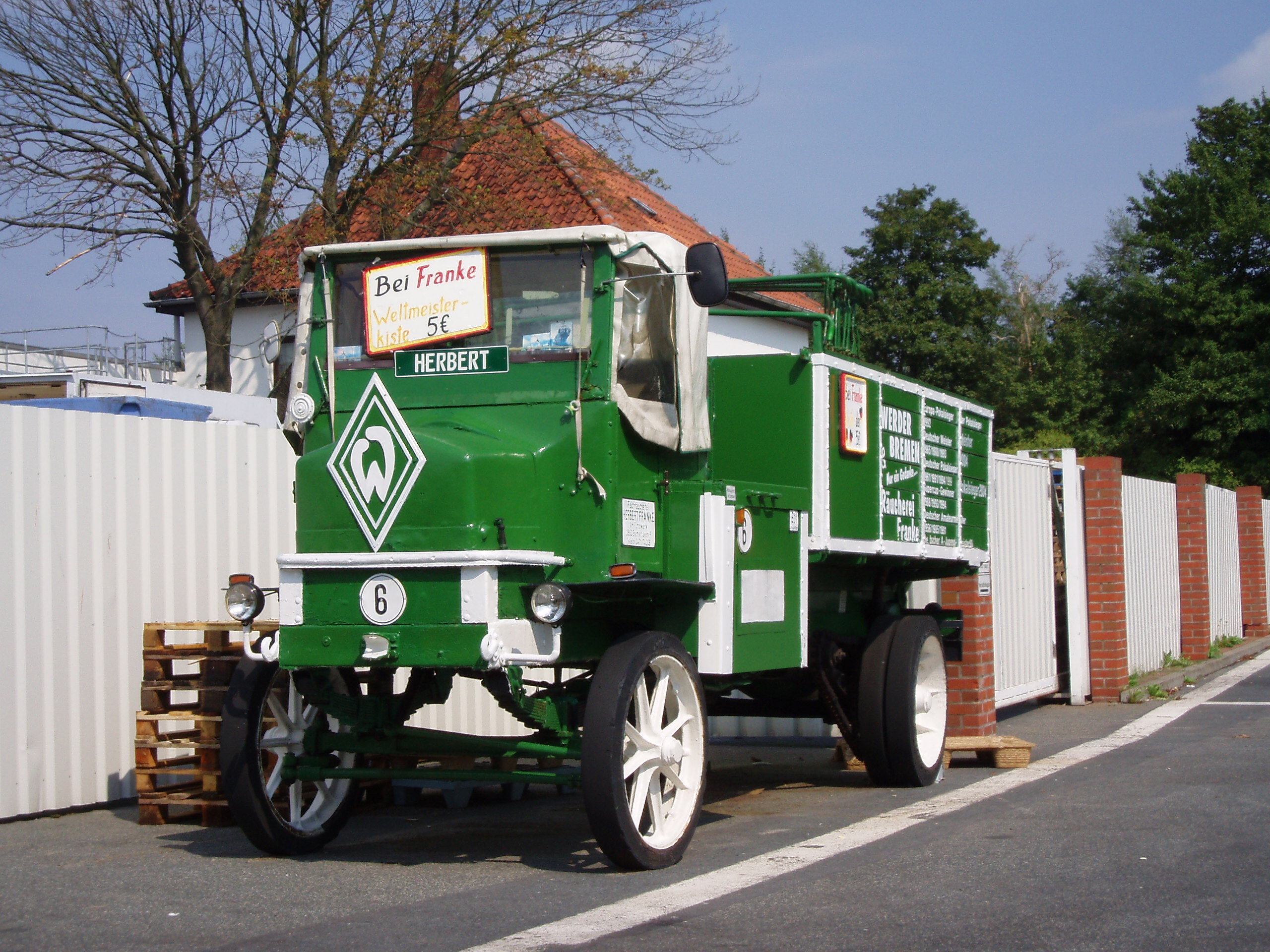 Fahrzeug in Bremerhaven